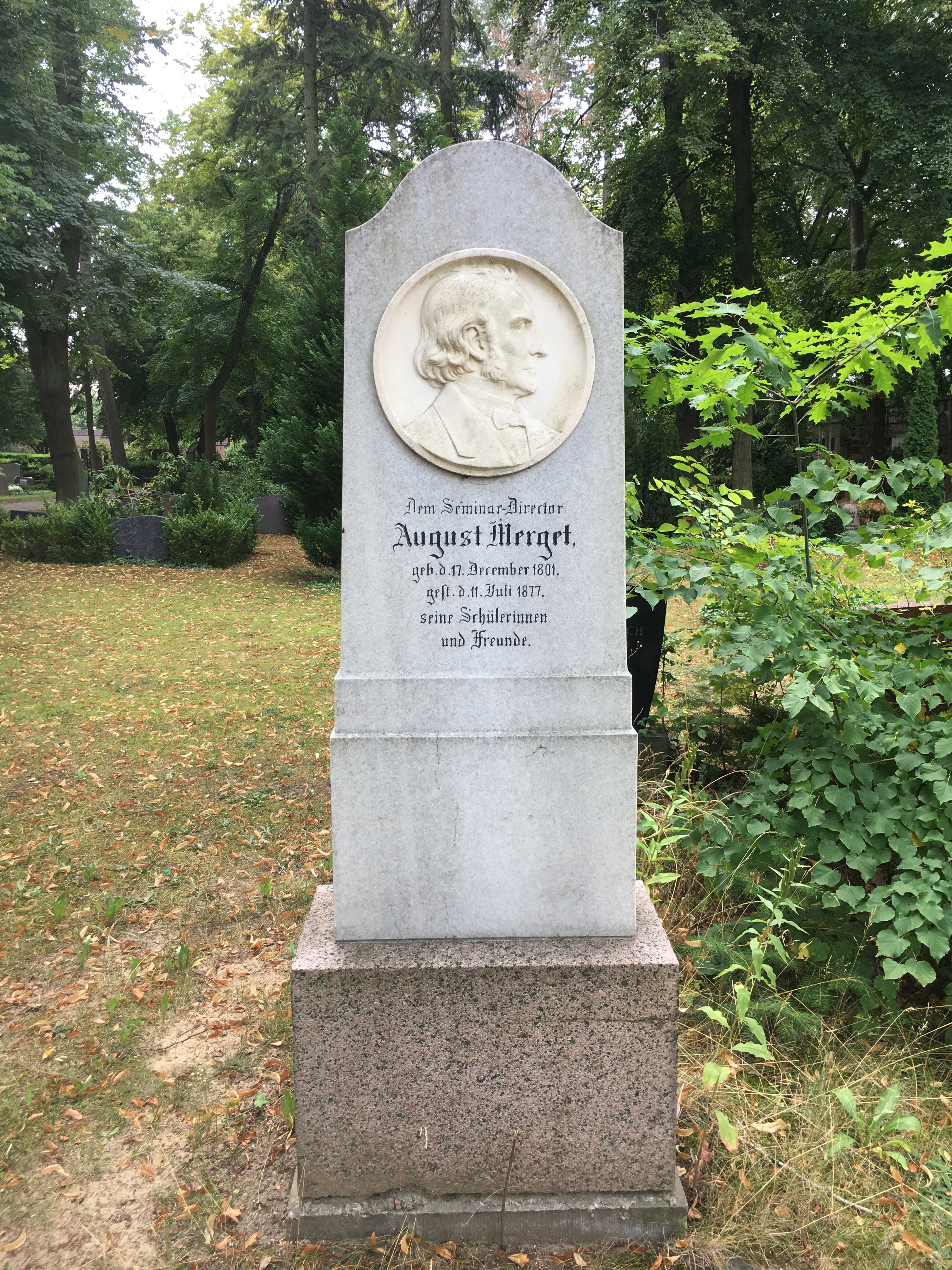 Grabstein August Merget